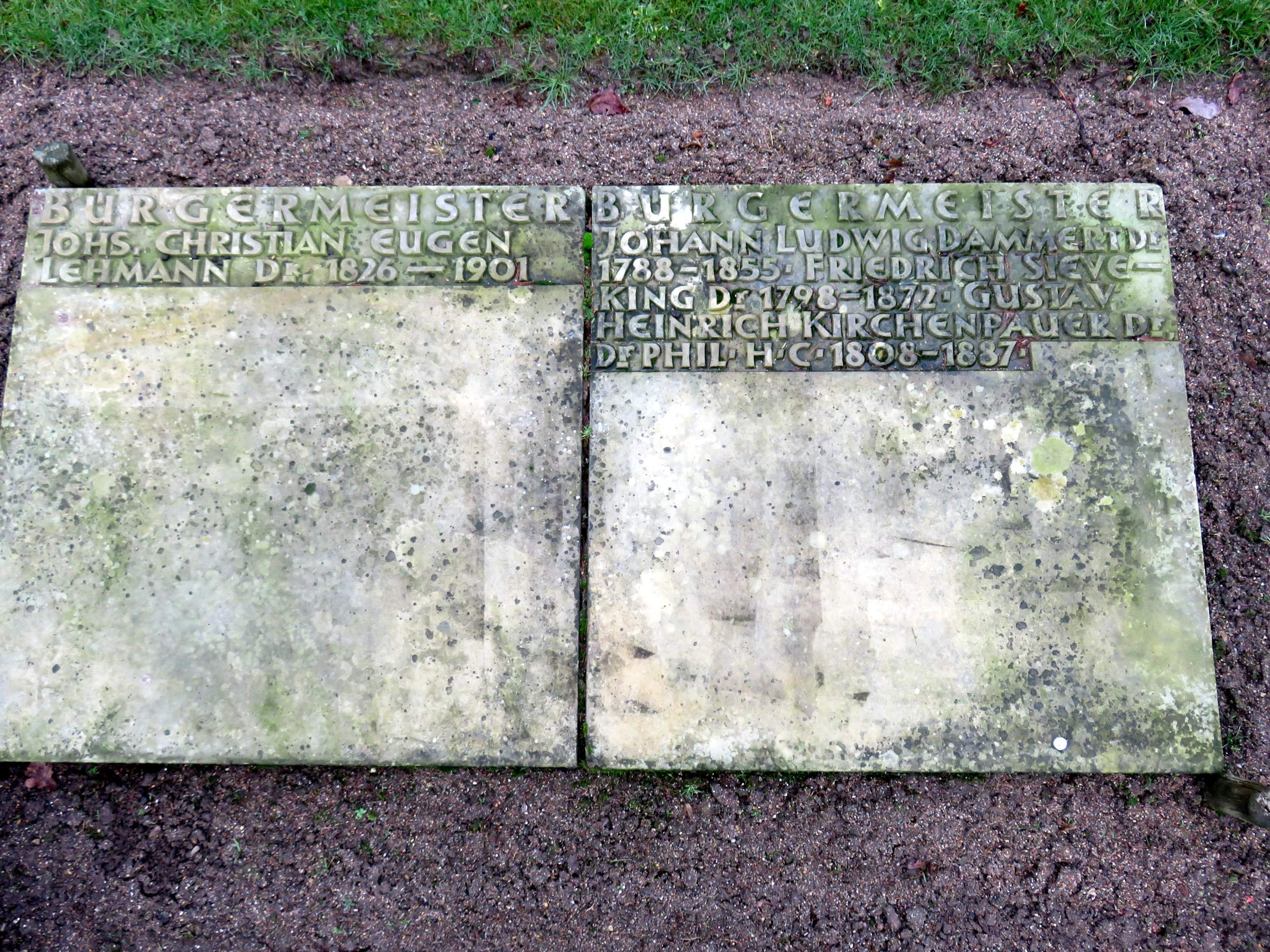 Doppelseitiges Sammelgrabmal Bürgermeister im Bereich des Althamburgischen Gedächtnisfriedhofs auf dem Hamburger Friedhof Ohlsdorf zu Ehren von u. a. Johs. Christian Eugen Lehmann, Friedrich Sieveking, Gustav Heinrich Kirchenpauer.